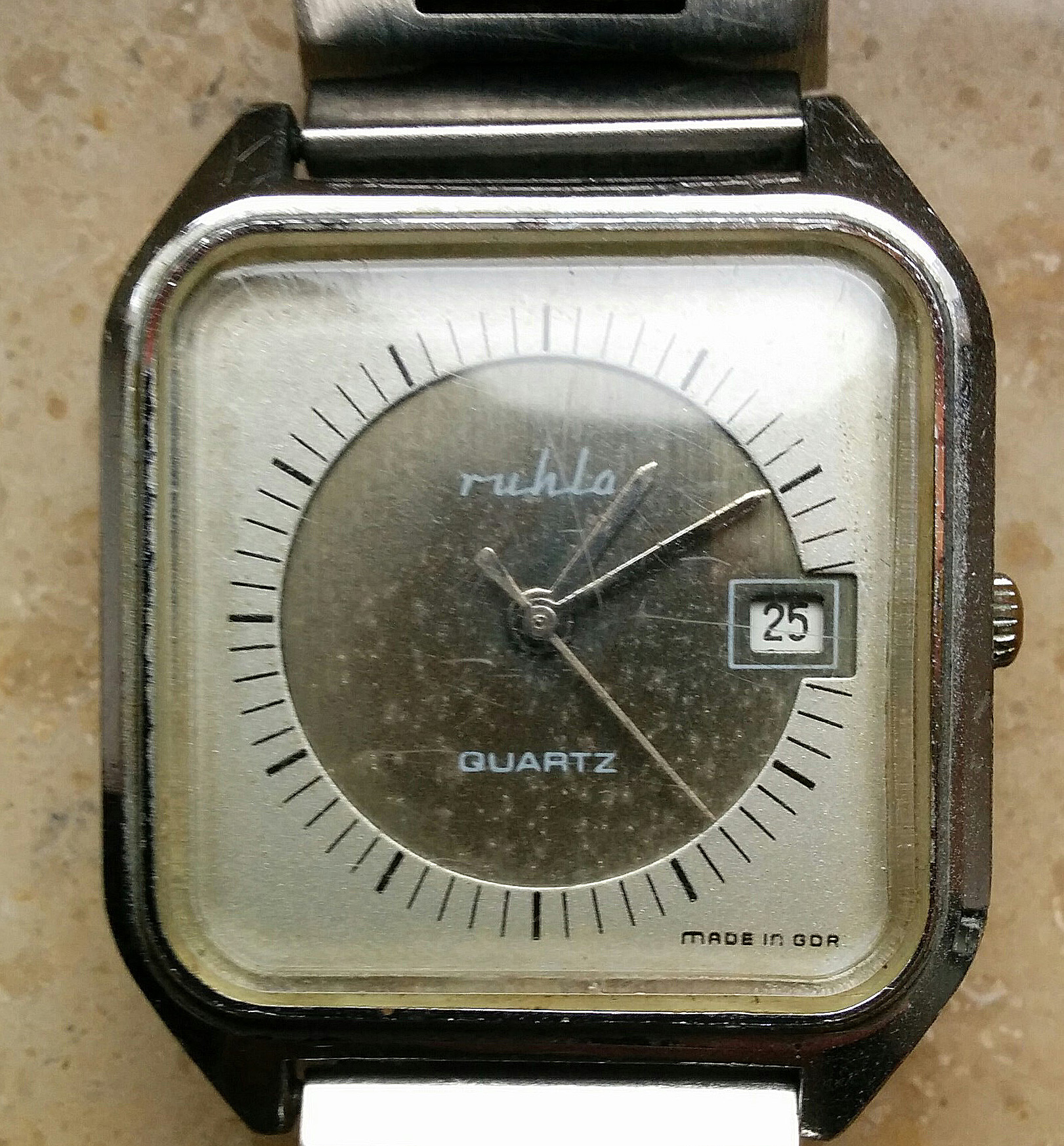 Quarz-Armbanduhr aus dem Jahre 1982 mit dem Zifferblattsignet 'ruhla'